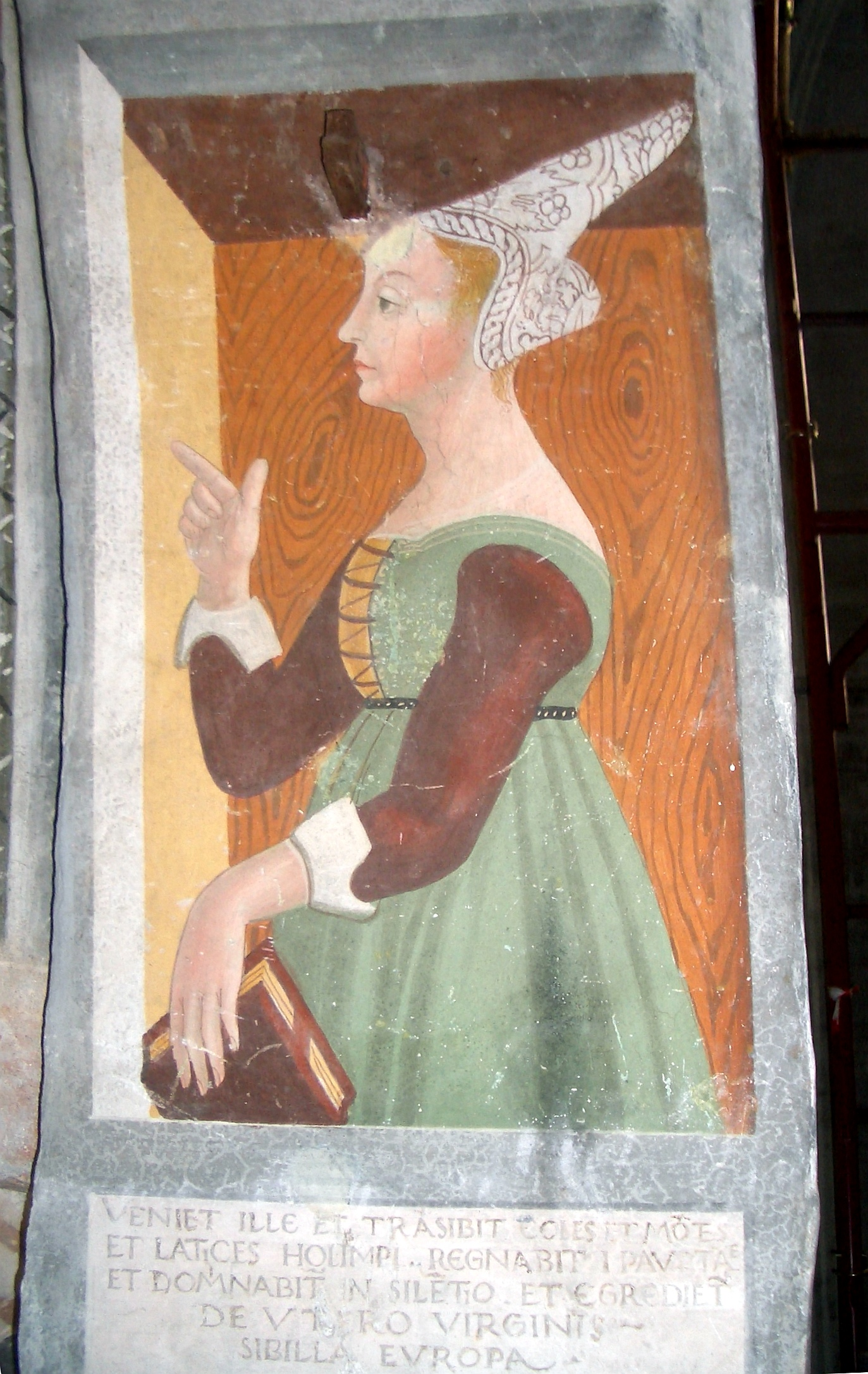 Giovanni Pietro da Cemmo, ‘’The Europe Sibyl’’, fresco, 1483- 1486, San Rocco church, Bagolino, Brescia, Italy